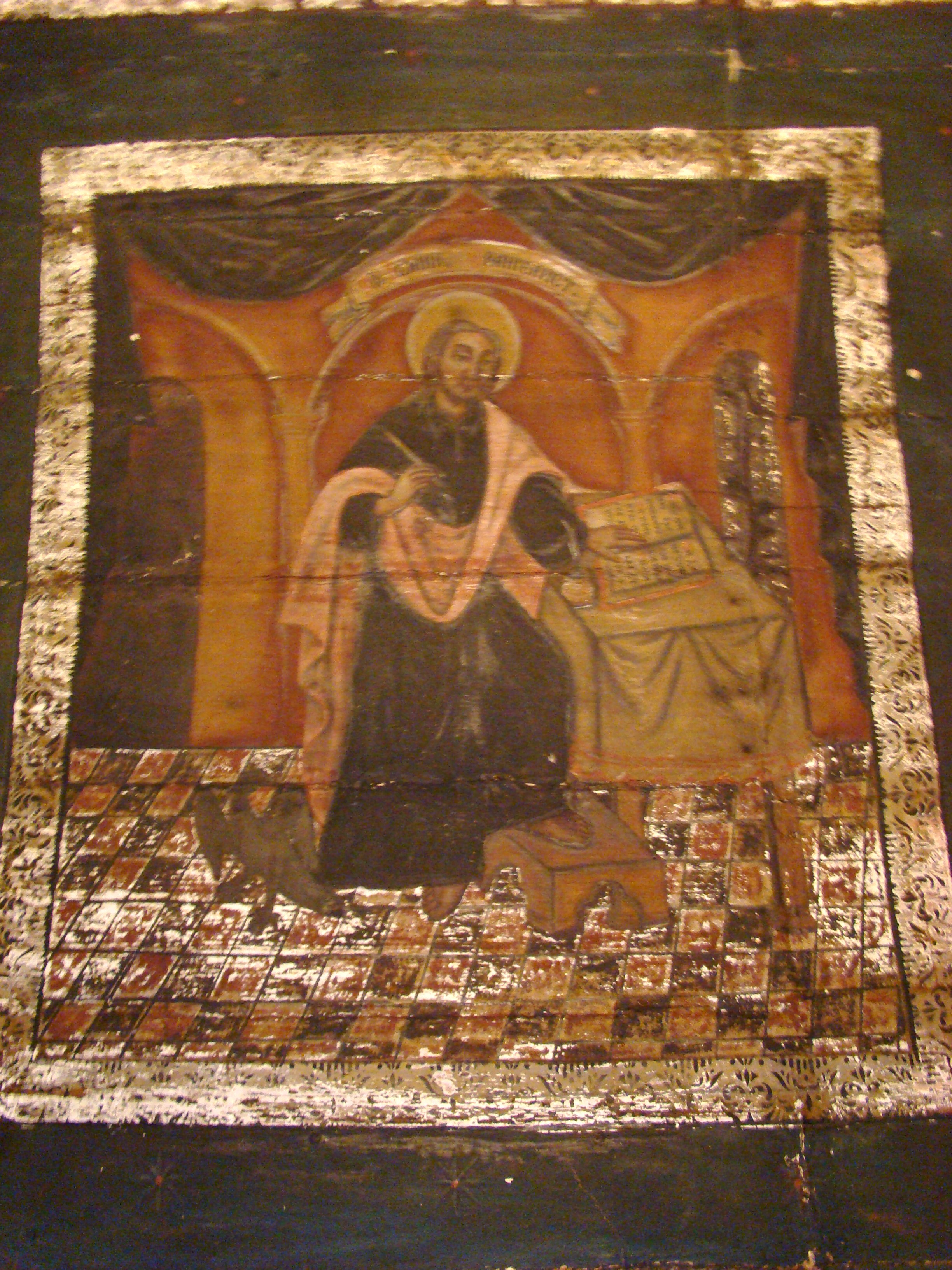 Biserica „Sf. Arhangheli Mihail și Gavriil” din Răstoci”, județul Sălaj